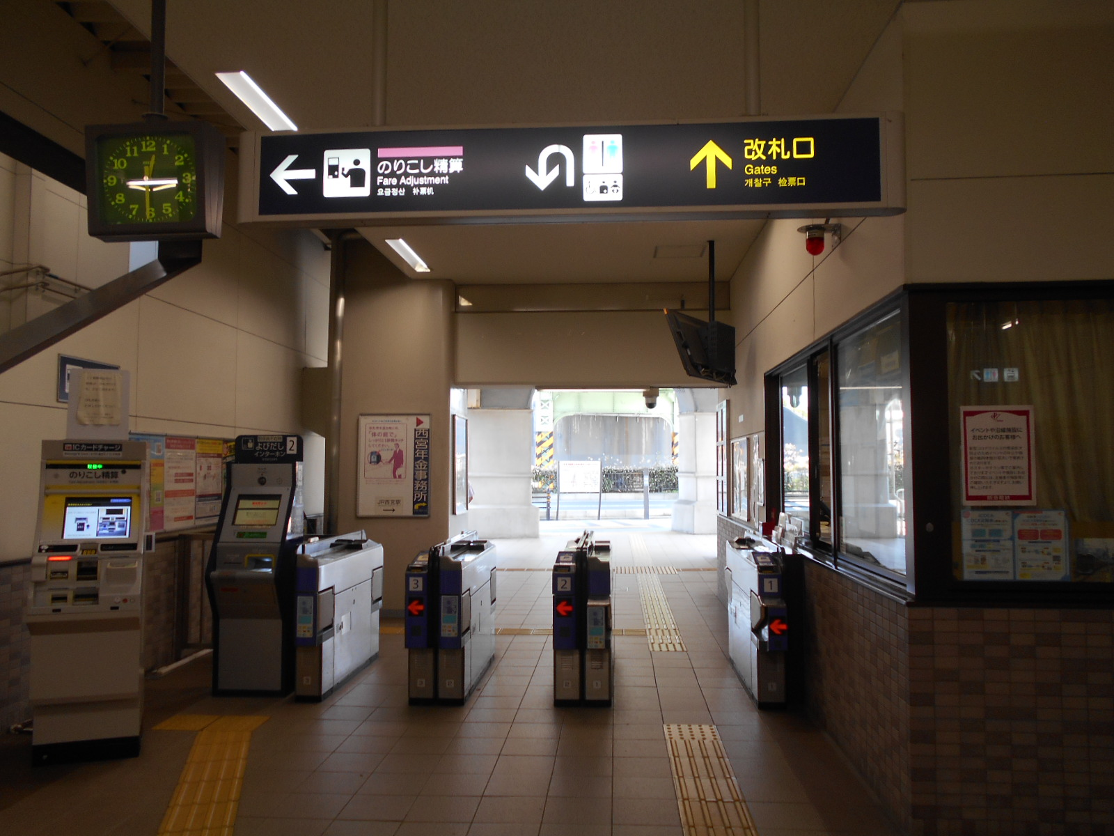 リニューアル済み